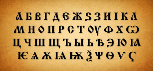 СтароБългарска Азбука